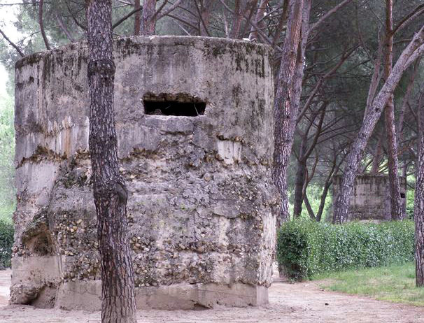 Fortín acorazado de ametralladoras de la Guerra Civil en el Parque del Oeste de Madrid. Hay tres.